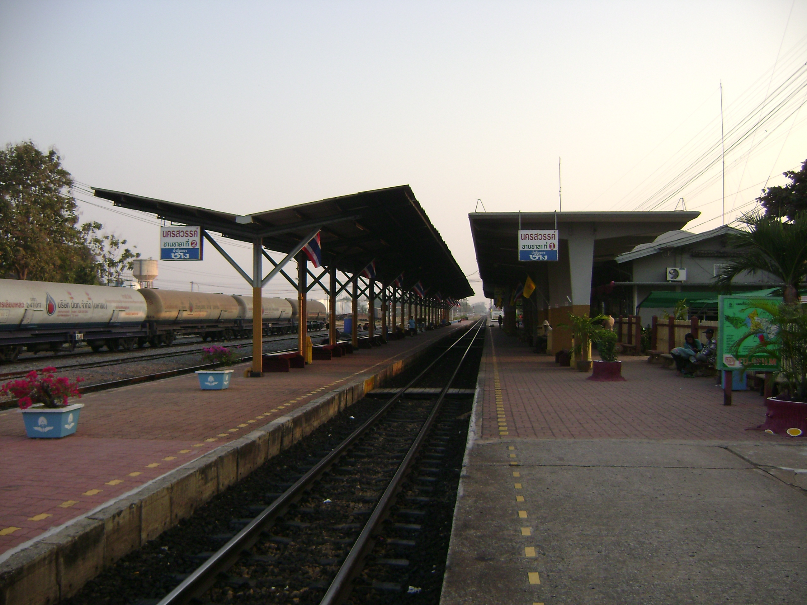 สถานีรถไฟนครสวรรค์ จังหวัดนครสวรรค์